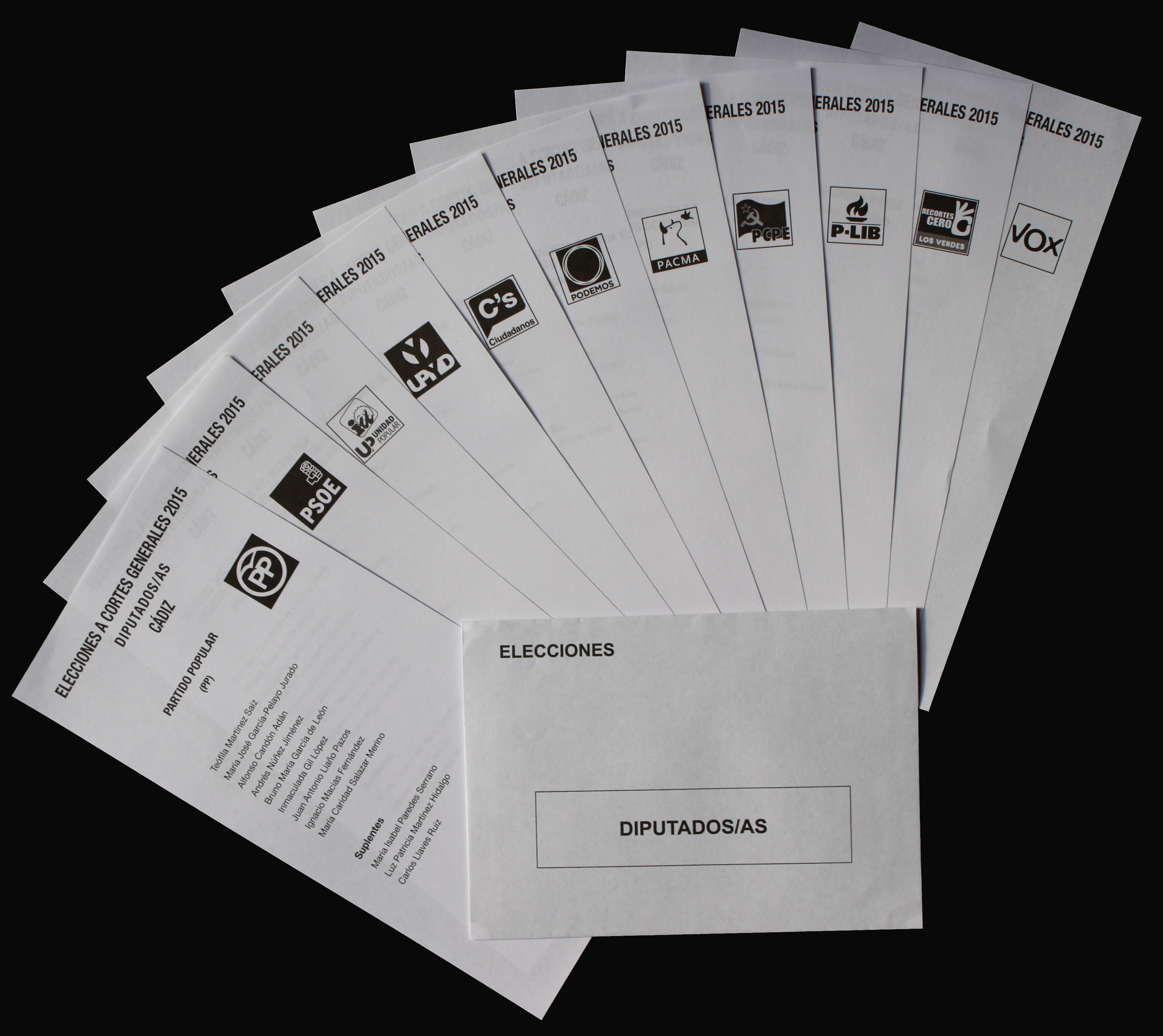 Papeletas electorales y sobre de votación para las Elecciones a las Cortes Generales de 2015 en España por la circunscripción de Cádiz provenientes del voto por correo. Se muestran las papeletas de las candidaturas del Partido Popular (PP), Partido Socialista Obrero Español (PSOE), Unidad Popular:Izquierda Unida Los Verdes-Convocatoria por Andalucía-Unidad Popular en Común (UP), Unión Progreso y Democracia (UPYD), Ciudadanos-Partido de la Ciudadanía (C's), Podemos (Podemos), Partido Animalista Contra el Maltrato Animal (PACMA), Partido Comunista de los Pueblos de España (PCPE), Partido Libertario (P-LIB), Recortes Cero-Grupo Verde y VOX.